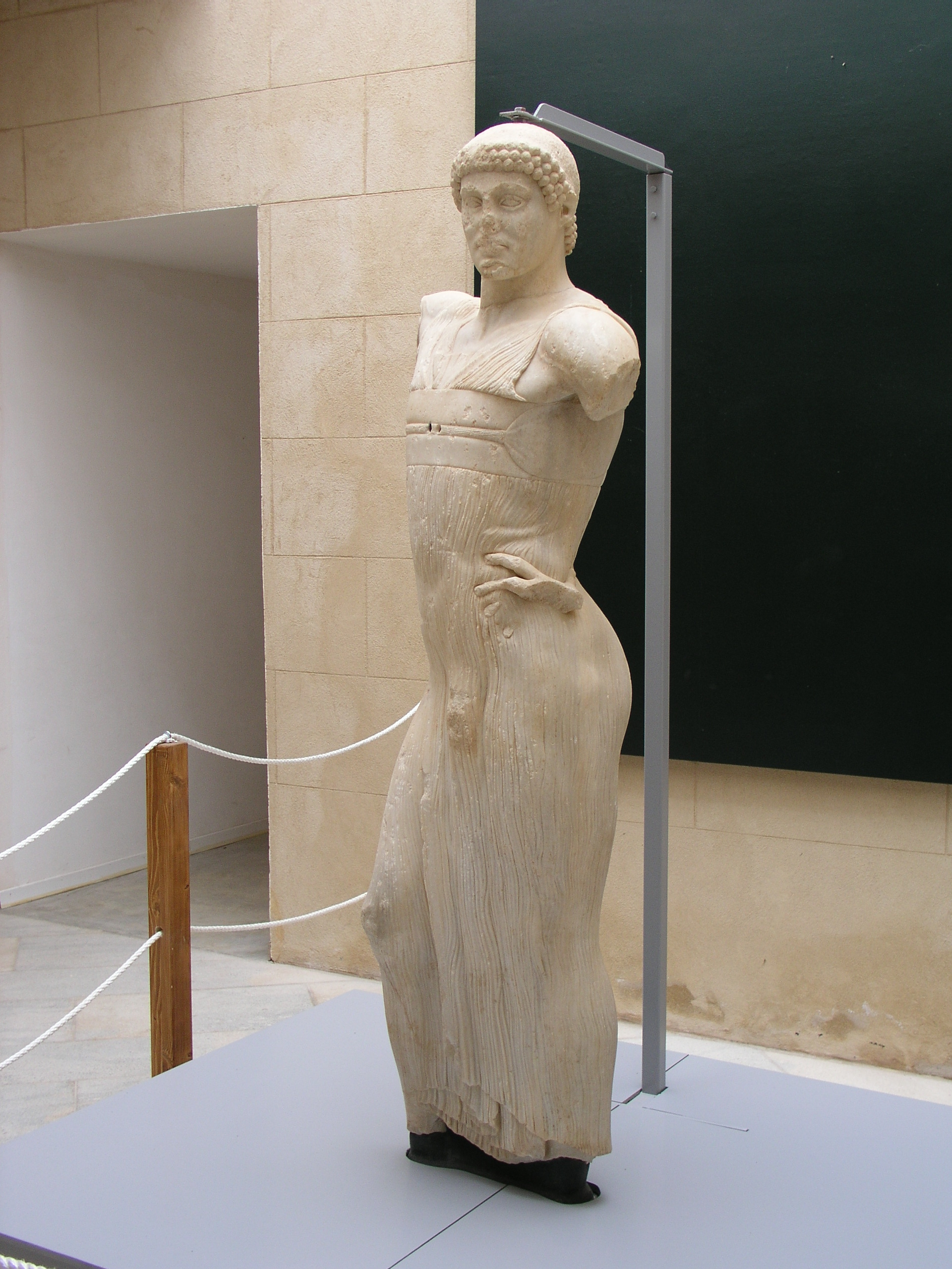 Giovinetto di Mozia (Young of Mozia) It: Secondo l'ipotesi maggiormente accreditata il cosidetto "Giovinetto di Mozia", una statua in stile greco risalente al 450/440 a.C., rappresenta un auriga o il dio fenicio-punico Melkart, sincretizzato nel pantheon grecoromano come Eracle. Dtsch: Nach der verbreitetetsten Hypothese repräsentiert der so genannte "Ephebe von Mozia", eine Marmorstatue im klassisch-griechischen Stil um 450/440 v.Chr., den phönizisch-punischen Gott Melkart, den die Griechen als Herkules in ihr Götterreich integrierten. Die Statue wurde am 26. Oktober 1979 bei Ausgrabungen auf Mozia gefunden (Zone K).